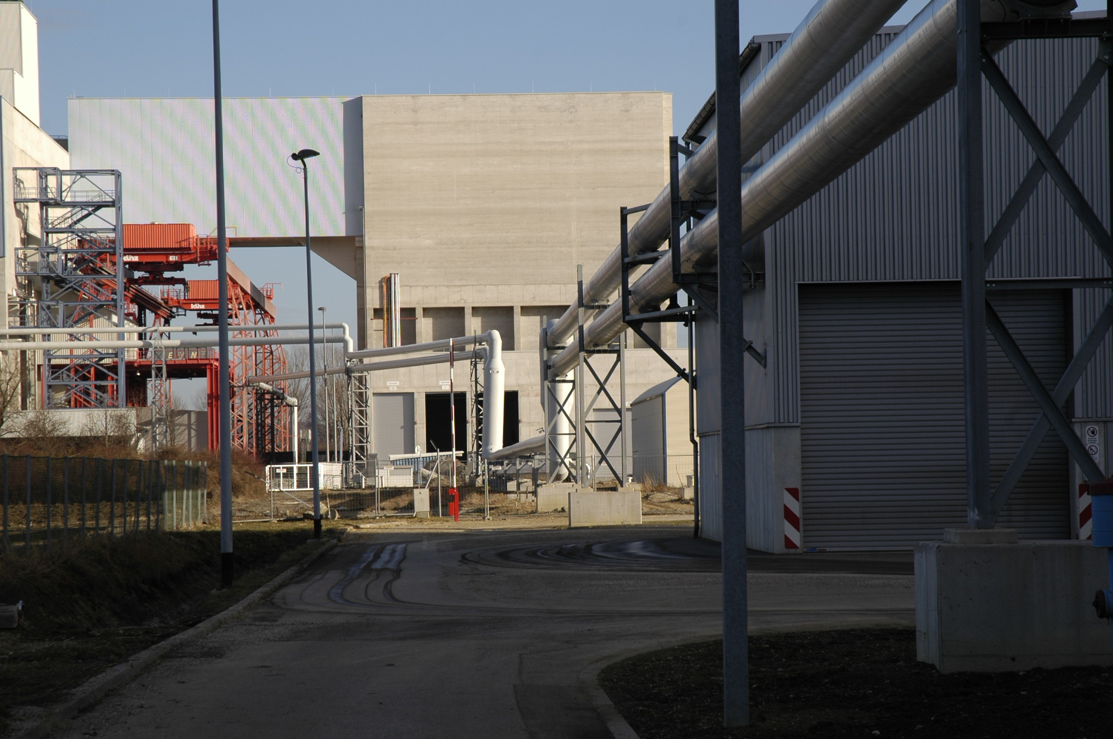 2 Stahlmantelrohrleitungen als freiverlegte Dampfleitung mit bis zu 50 bar und im Hintergrund die Müllverbrennungsanlage der EVN